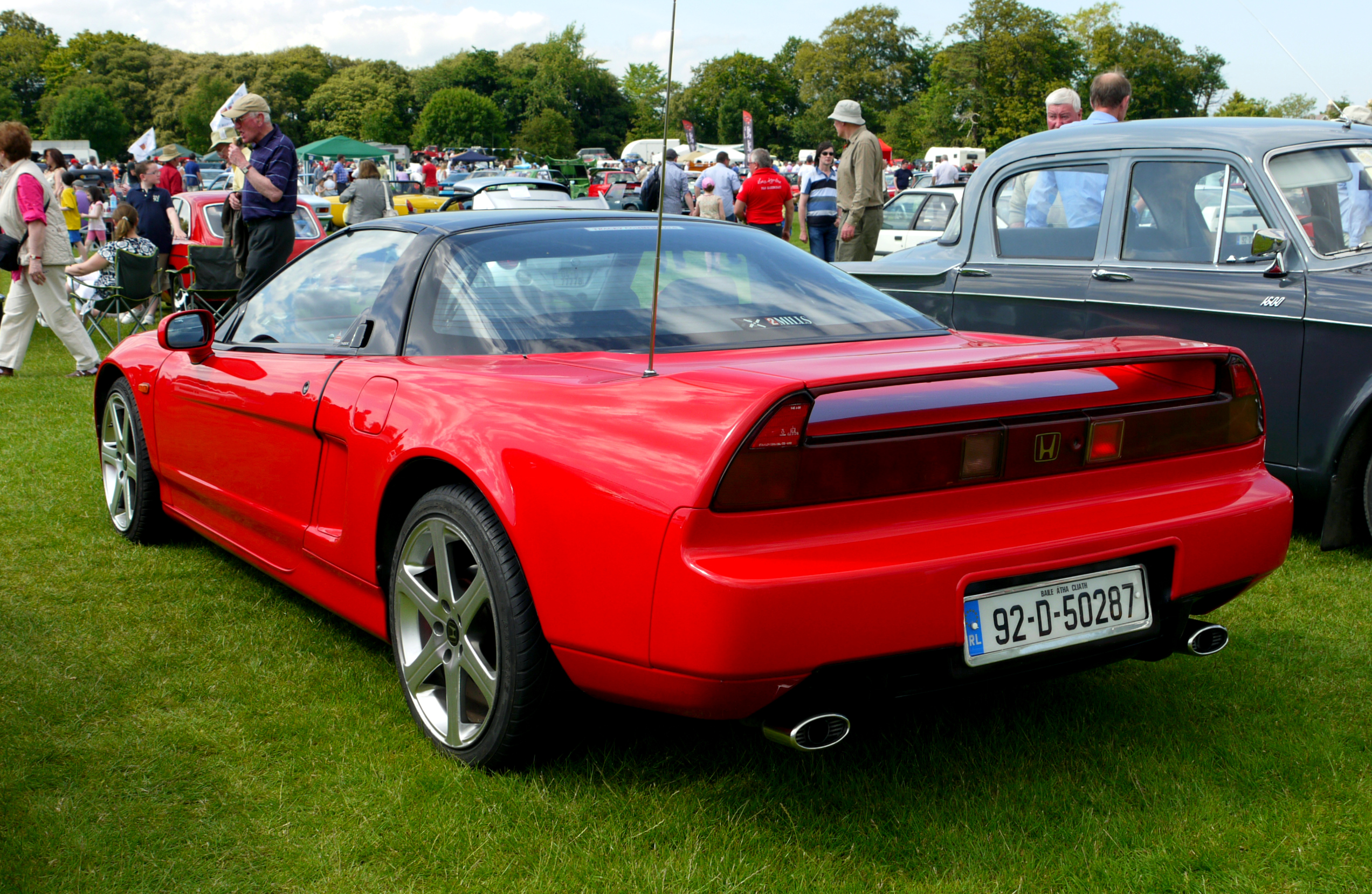 1992 Honda NSX.